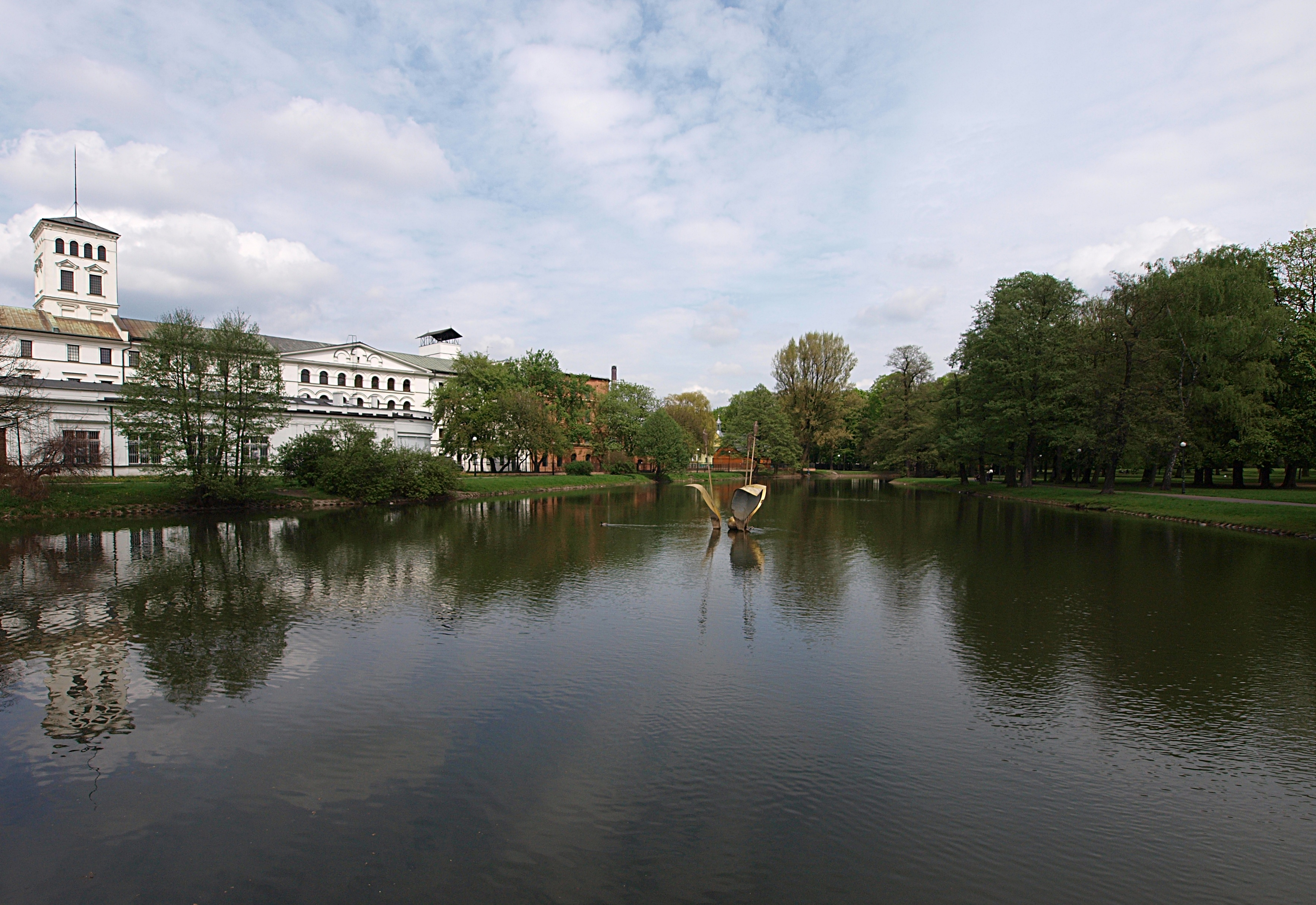 Fabryka Ludwika Geyera mieszcząca Muzeum Włókiennictwa i staw w parku Reymonta.